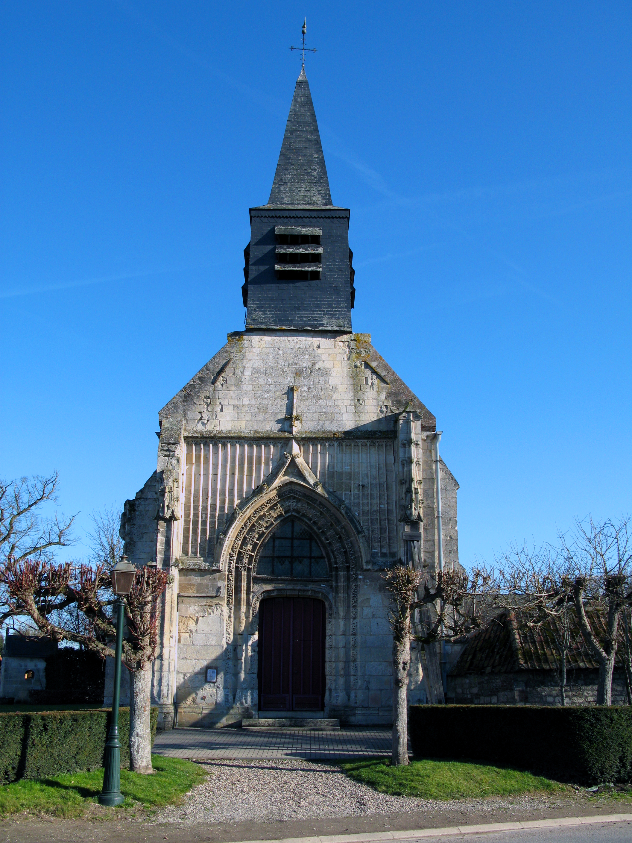 Frémontiers (Somme, France) - L'église Saint-Pierre. . .